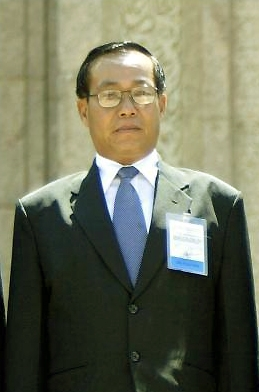 Soe Win, Burma Prime Minister.